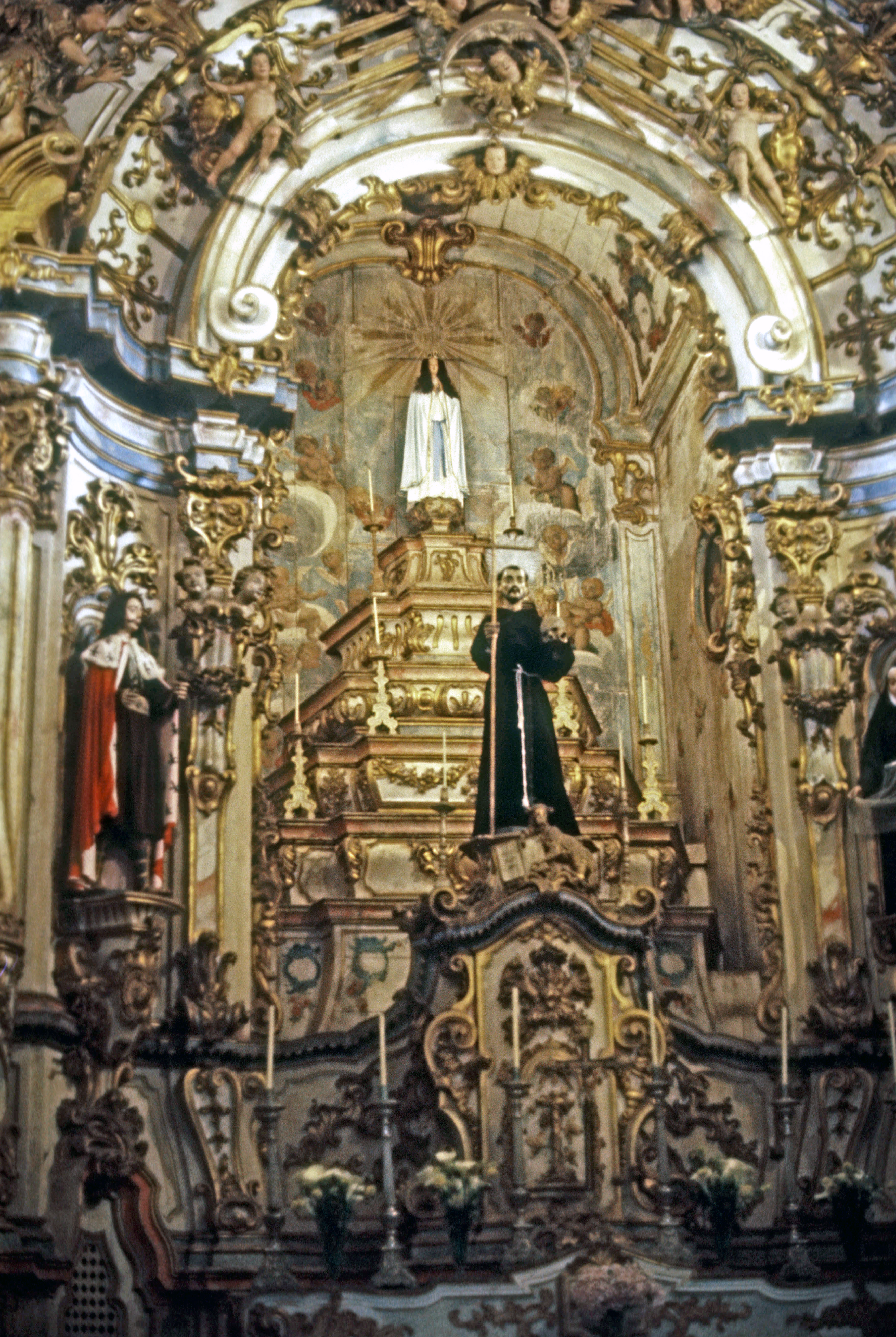 Altar-mor da Igreja de S. Francisco de Ouro Preto (o título do arquivo, imitado da foto que lhe deu origem, é equivocado, segundo comparação com fontes seguras, como Oliveira, Myriam A. Ribeiro de & Campos, Adalgisa Arantes. Barroco e Rococó nas Igrejas de Ouro Preto e Mariana. Iphan / Programa Monumenta, 2010)